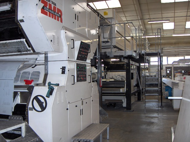 Rotative (imprimerie). On distingue, au premier plan, une plaque en cours d'insertion automatique. Summary Rotative Timson ZMR à l'imprimerie Jouve (Mayenne). Description technique Photographie prise avec un appareil numérique HP Photosmart R707 5,1 MPx. VGA, f/2,9, 1/121 s, flash 1000 bcps, ISO 119 Statut César Alexanian